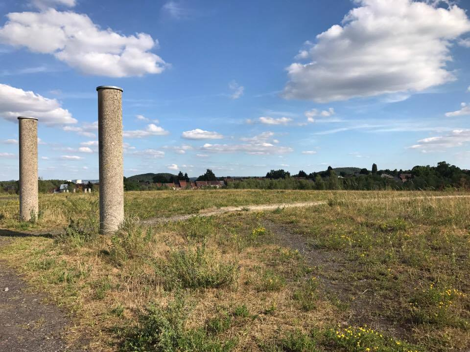 Panorama